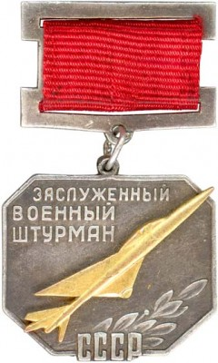 Знак «Заслуженный военный штурман СССР»